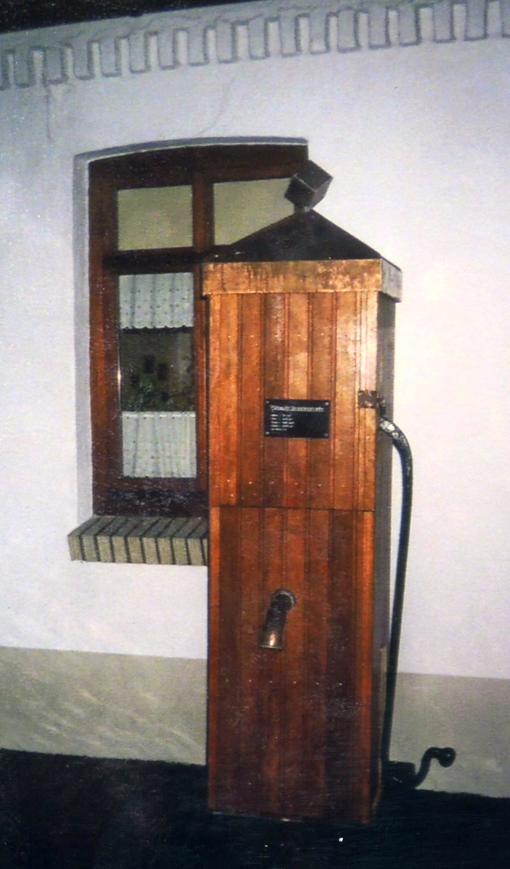 Drostenpütt in Jever (Drostenstraße)